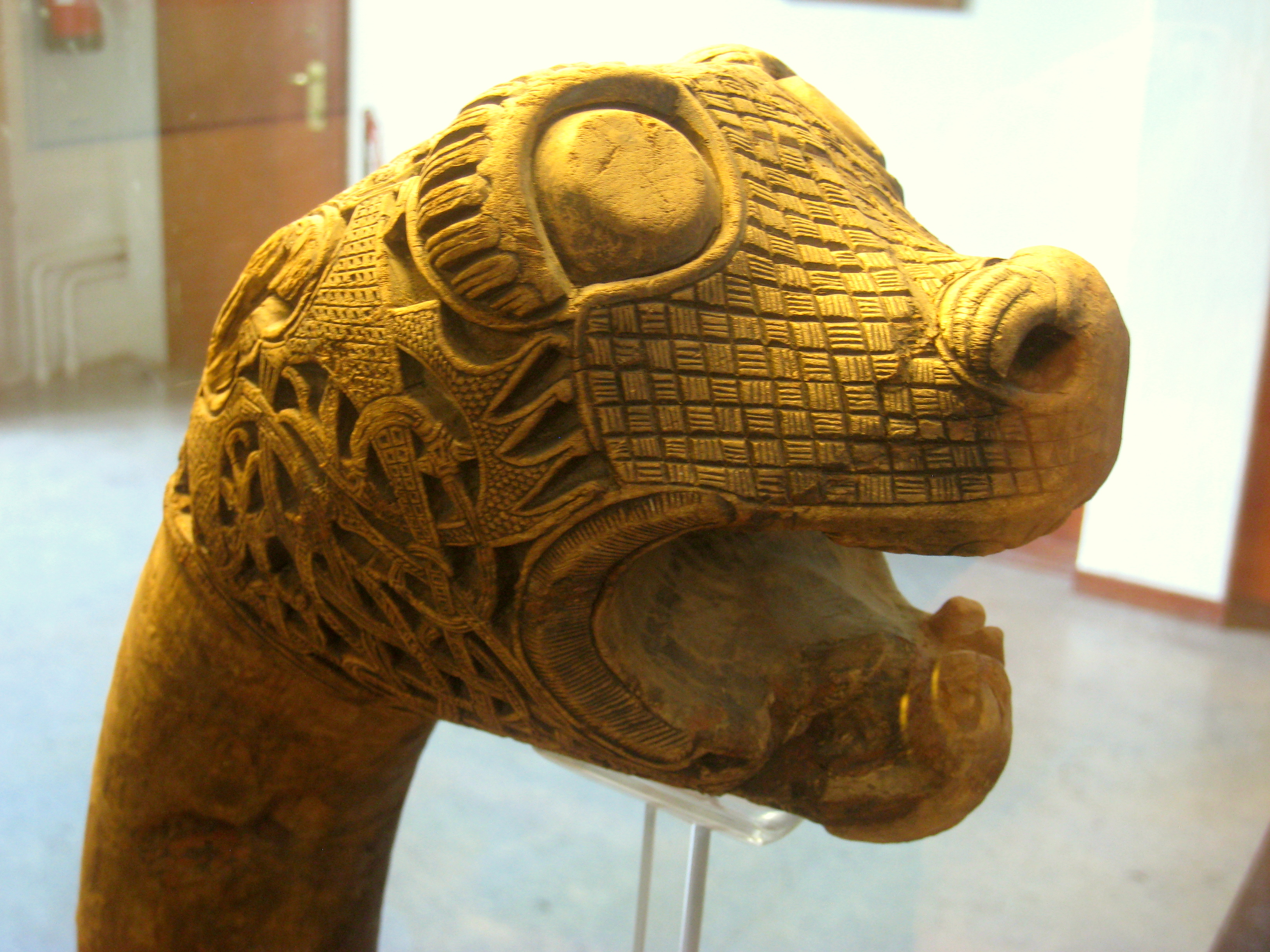 Kulturhistorisk museum (Viking Ship Museum), Oslo, Norway.